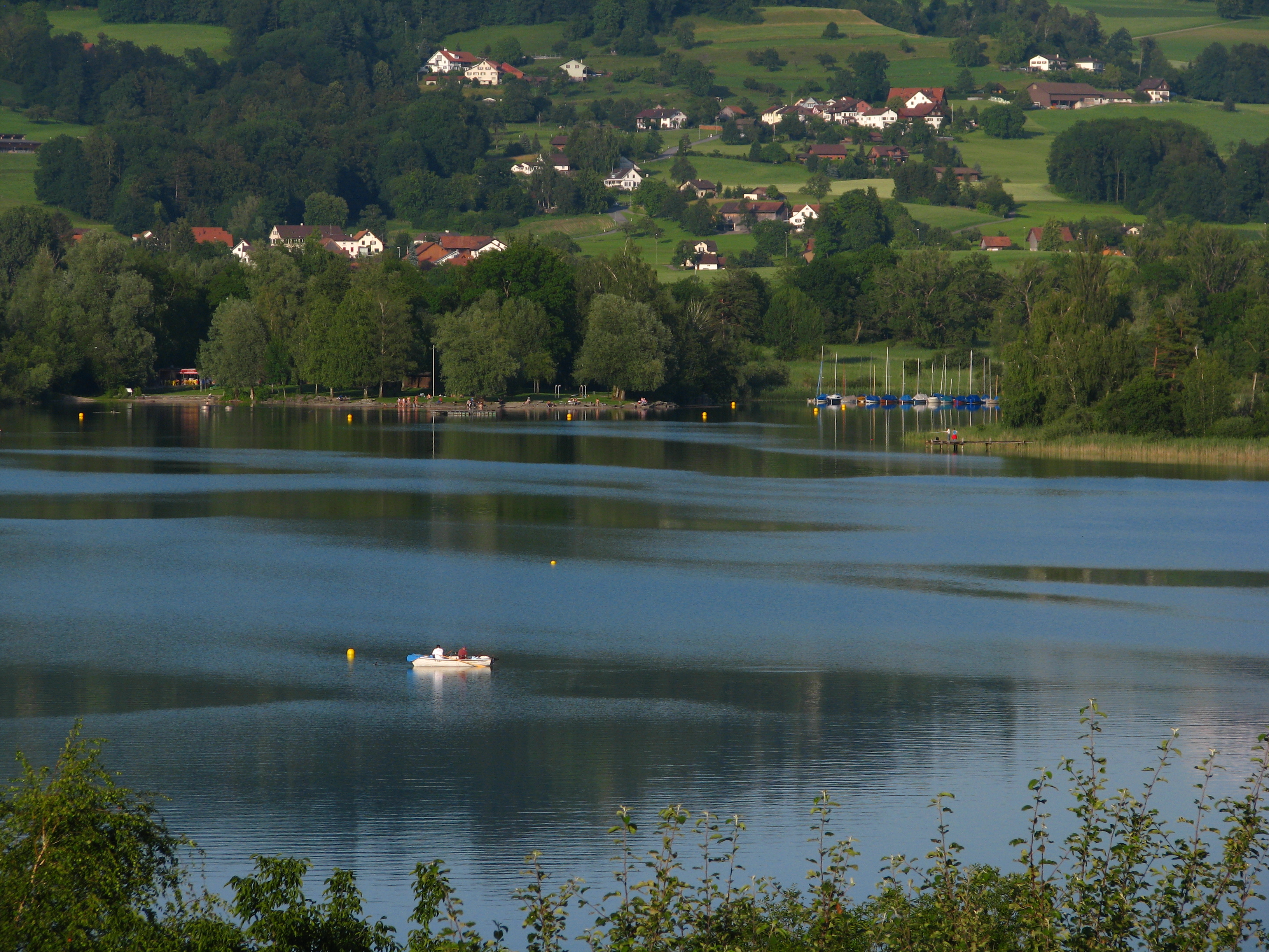 Auslikon (Pfäffikon) as seen from Seegräben.